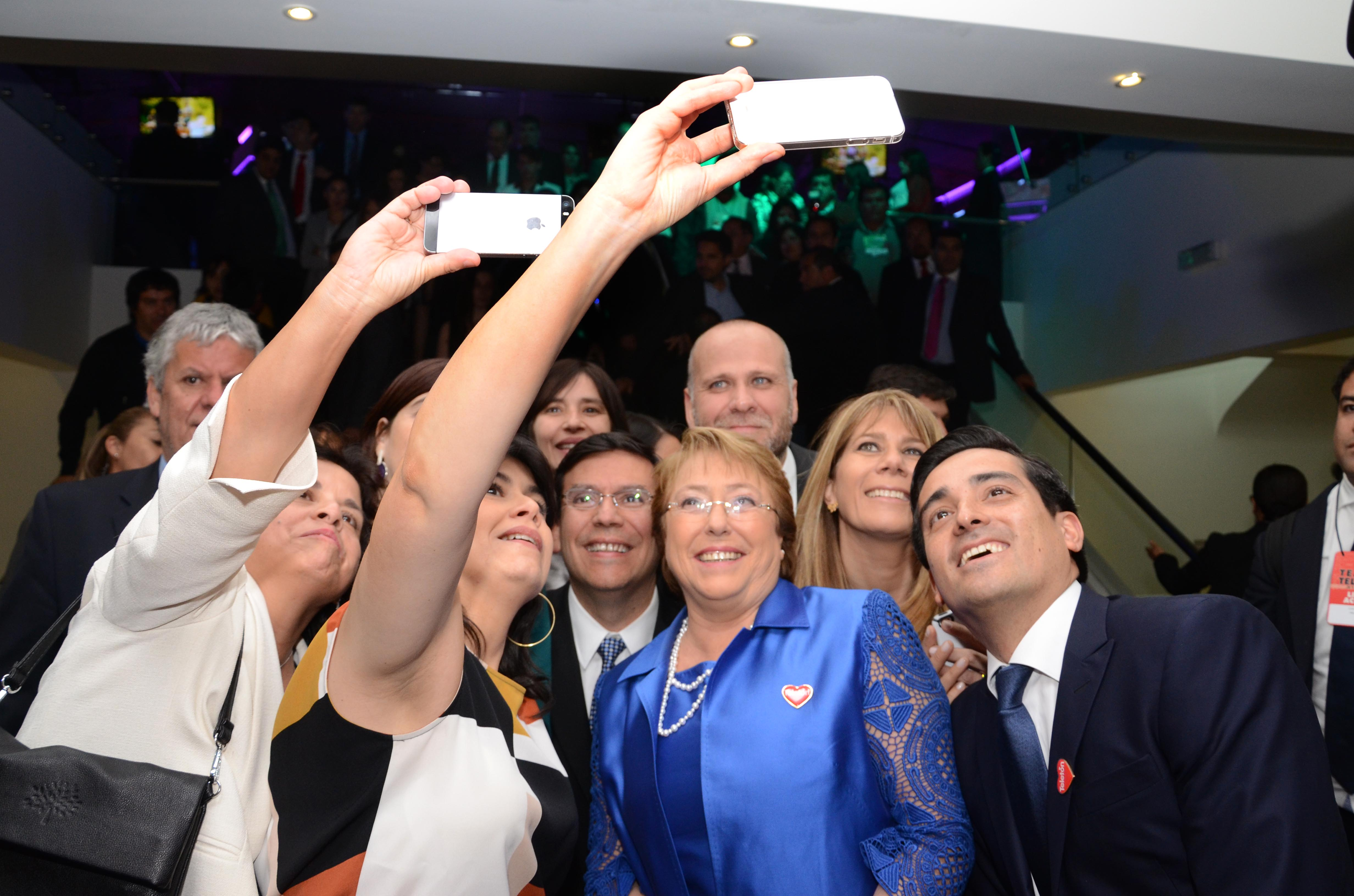 Ministro Elizalde asiste a la Ceremonia Inaugural de la Teletón